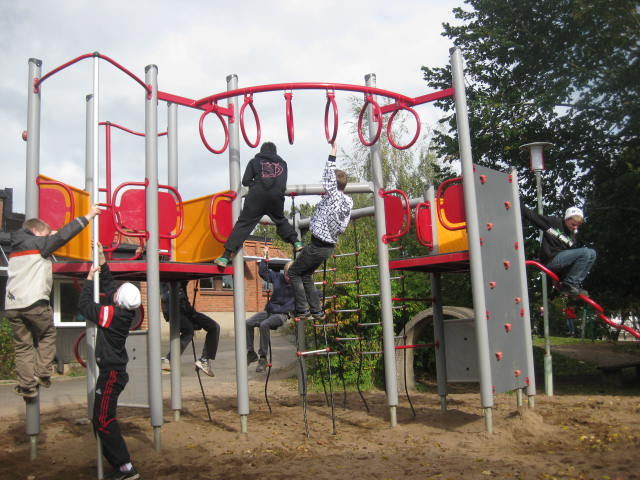 En klätterställning.